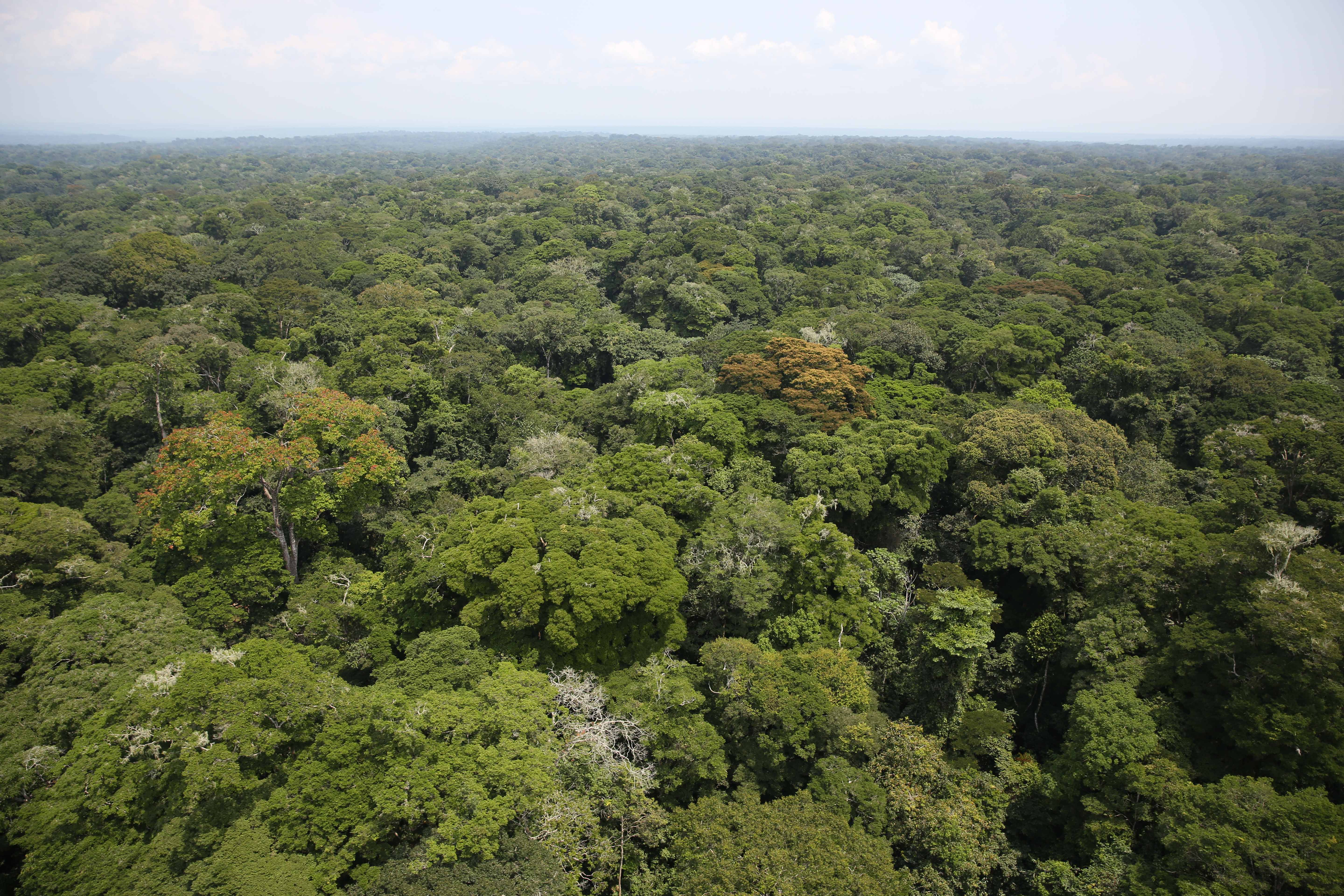 photo MONUSCO / Abel Kavanagh